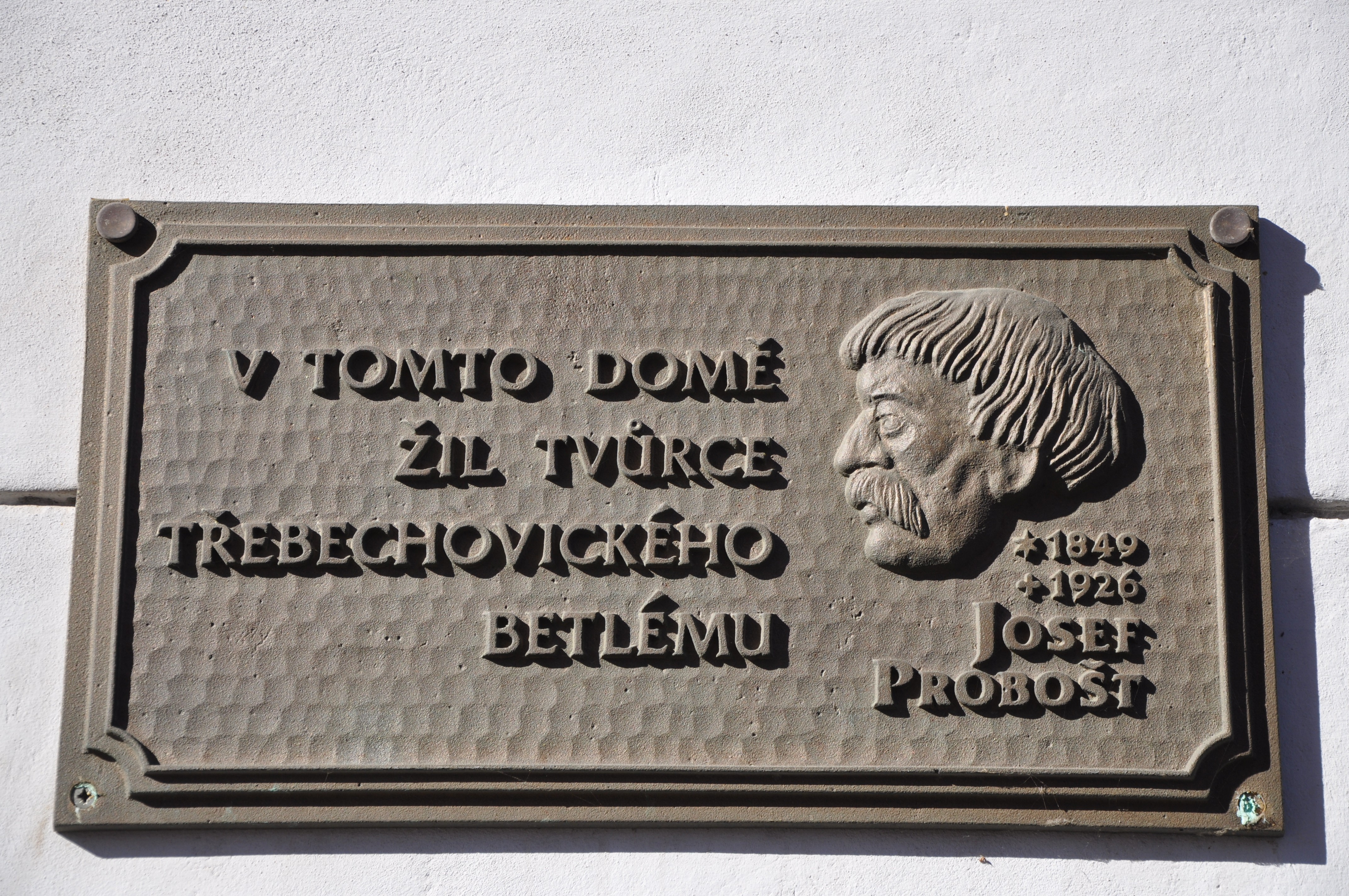 Pamětní deska Josefa Probošta na domě č.p. 9 v Třebechovicích.